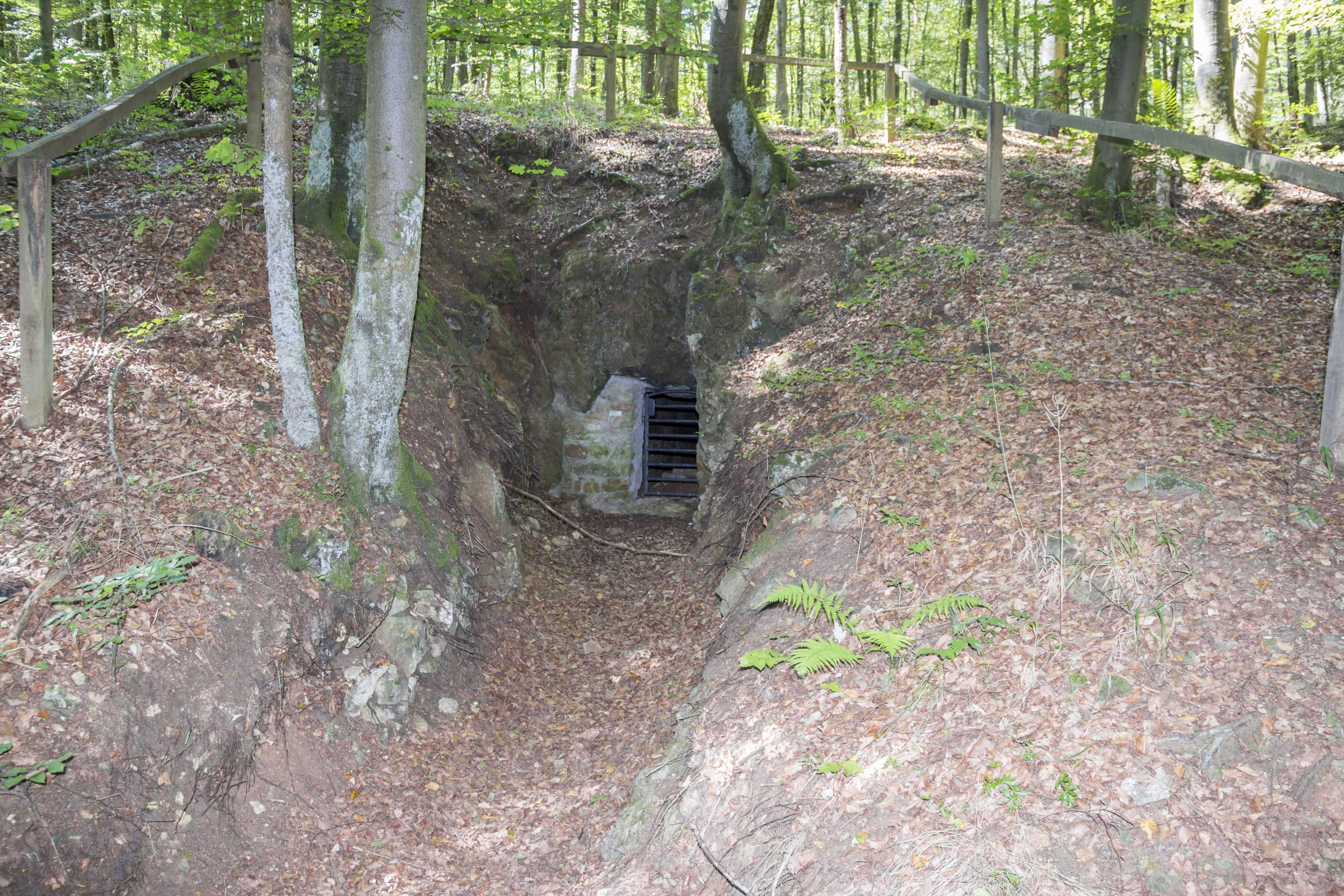 Grubschwart, ehemaliges Bergwerk, Höhle, Stollen, Raitenbucher Forst, Eingang Blindschacht